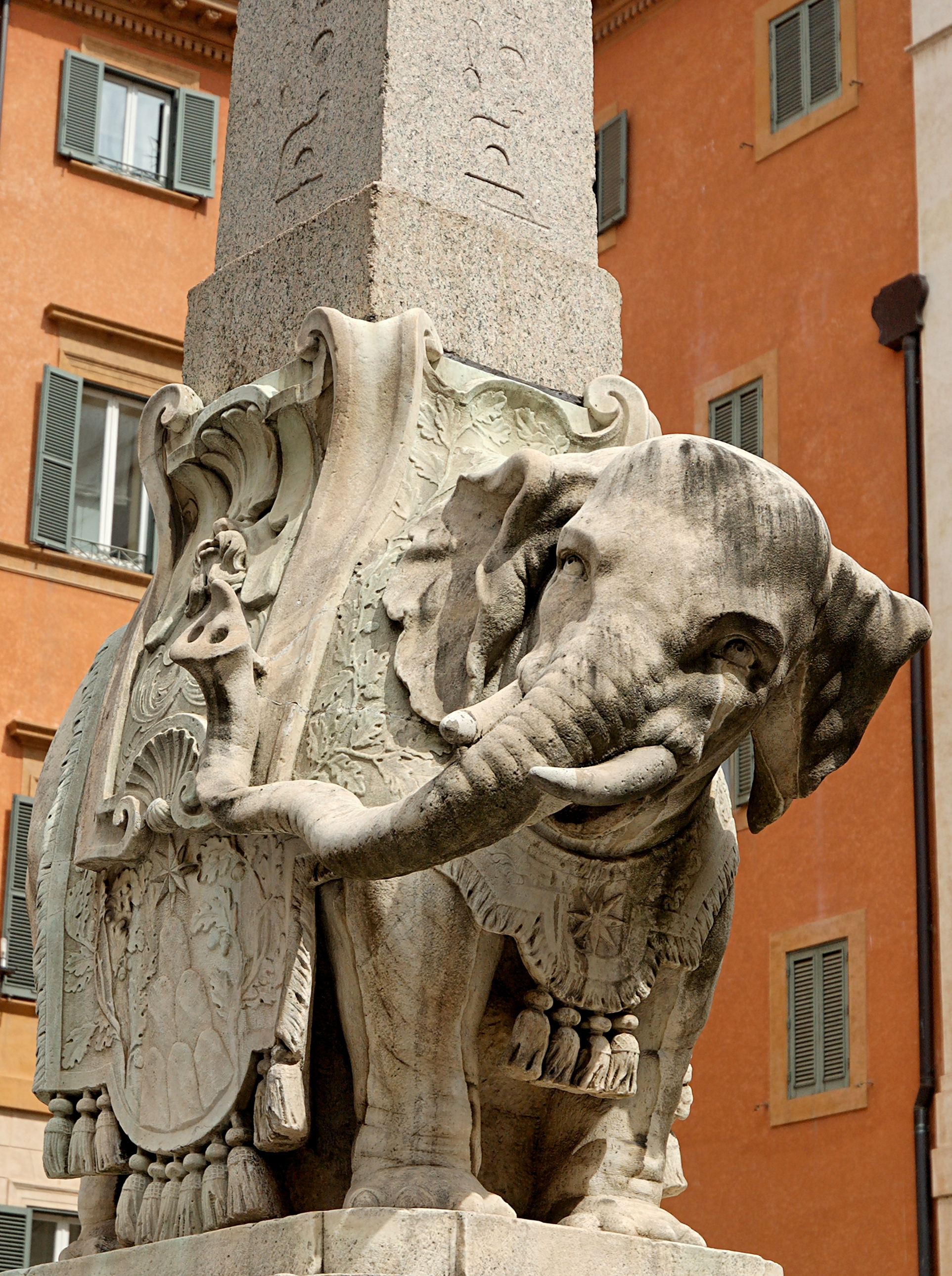 So-called “Minerva's chick”, by Bernini. Piazza della Minerva, Rome, Italy.